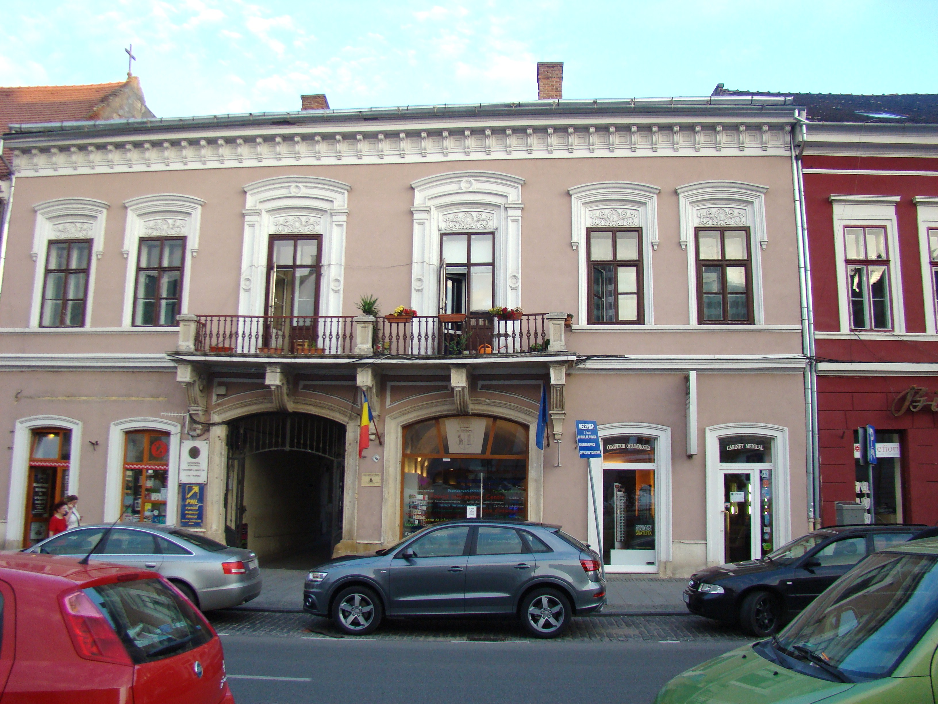 Clădire monument istoric, Bd.Eroilor, nr. 6